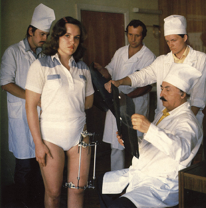 Gawriil Abramowitsch Ilisarow bei der Untersuchung einer Patientin in Kurgan.